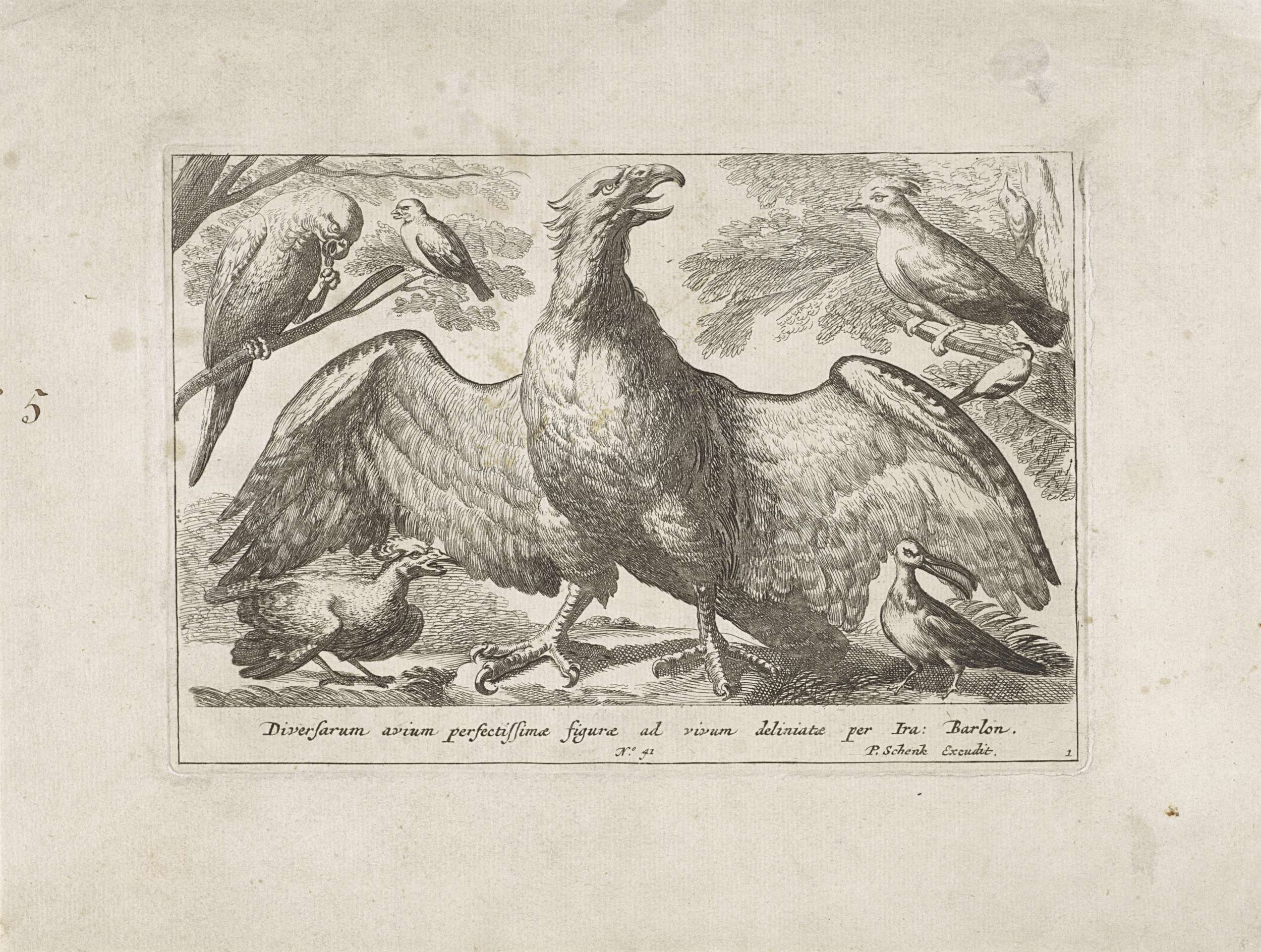 Een arend met uitgeslagen vleugels, omgeven door verschillende vogels.; Iconclasscode: 25F3; Iconclasscode: 25F33(EAGLE); print